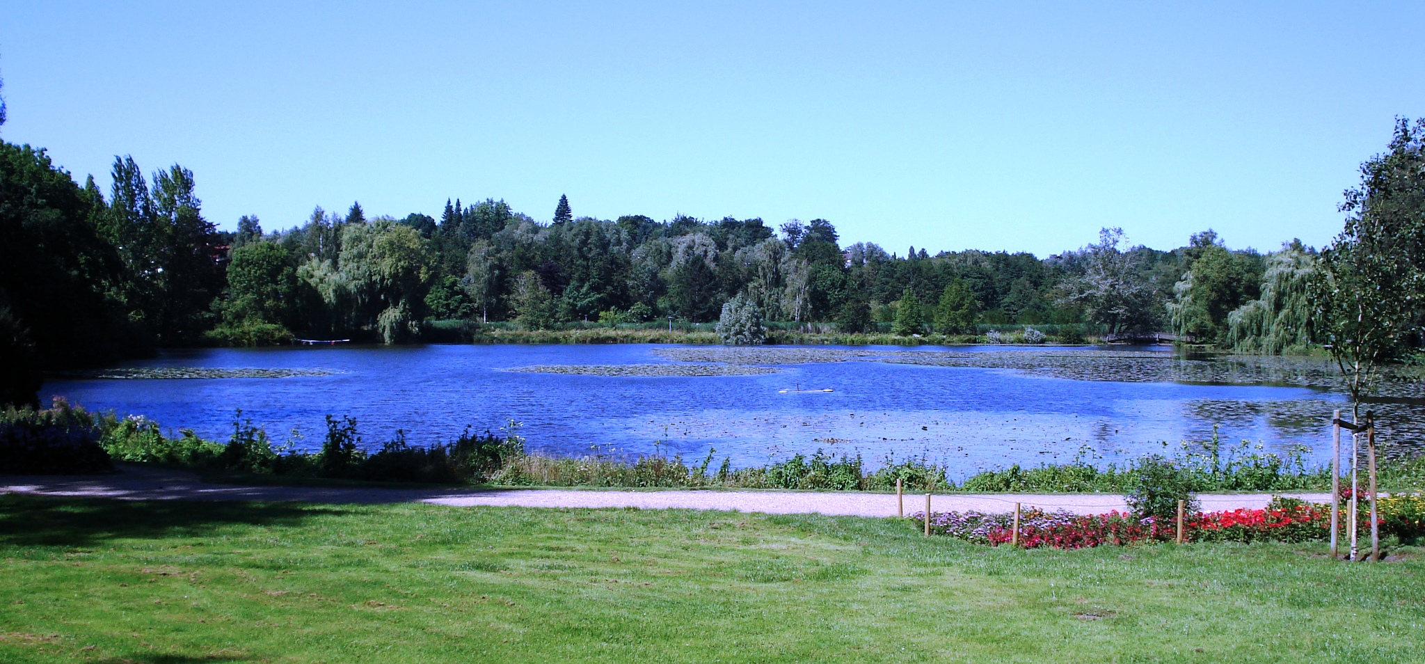 Der Schwartauer See